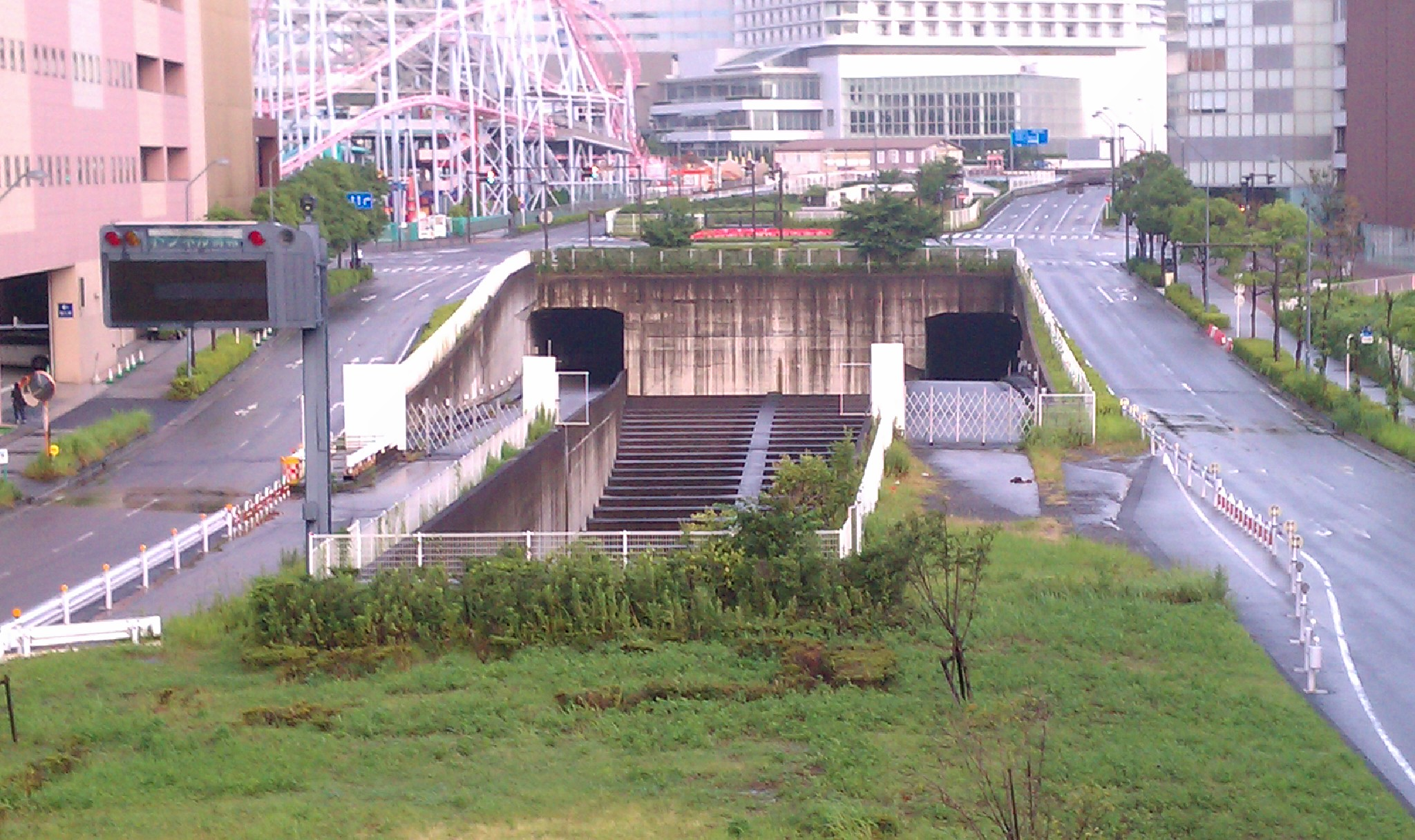 横浜港臨港幹線道路の「みなとみらいトンネル」、開通前の状態。ワールドポーターズ前のトンネル入り口部分。サークルウォークより2012年7月撮影。